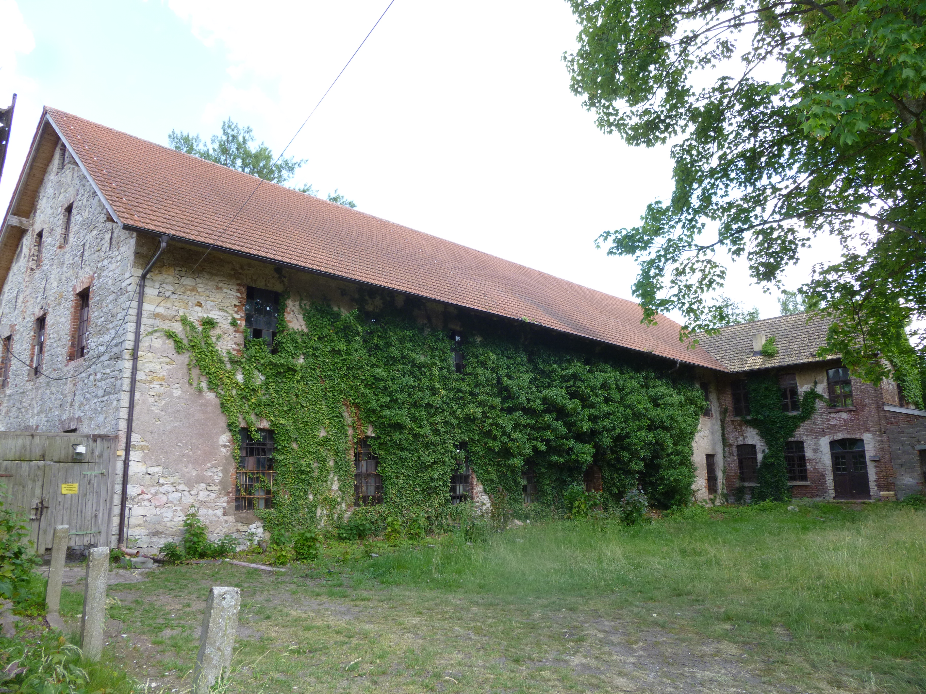 Ehemaliges Schleif- und Polierwerk, Münchshofen